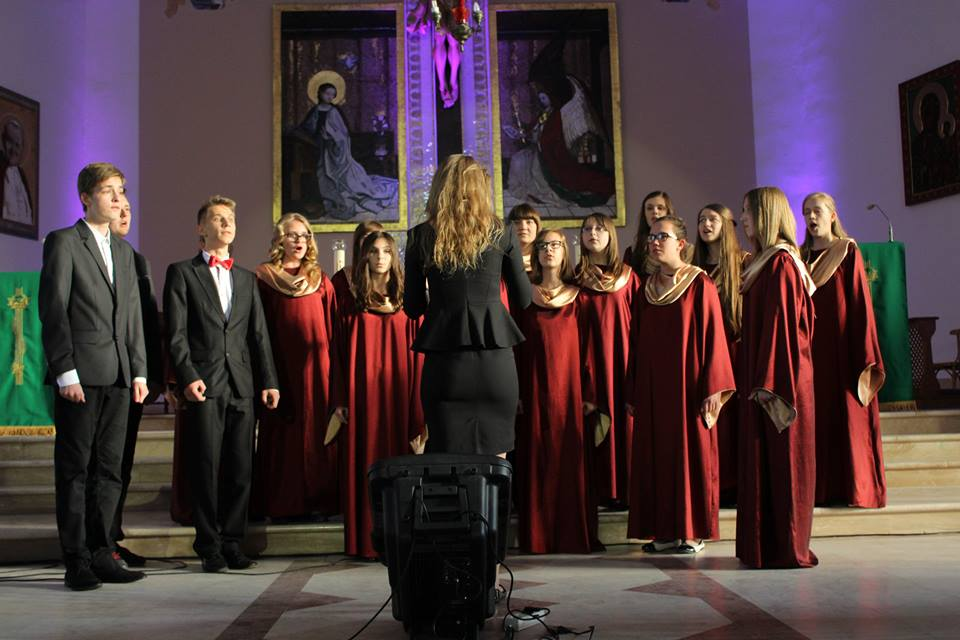 Występ Fletni Pana podczas 16. Festiwalu Pieśni Sakralnej